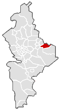 Ubicación geográfica del municipio de Doctor Coss en el estado mexicano de Nuevo León.